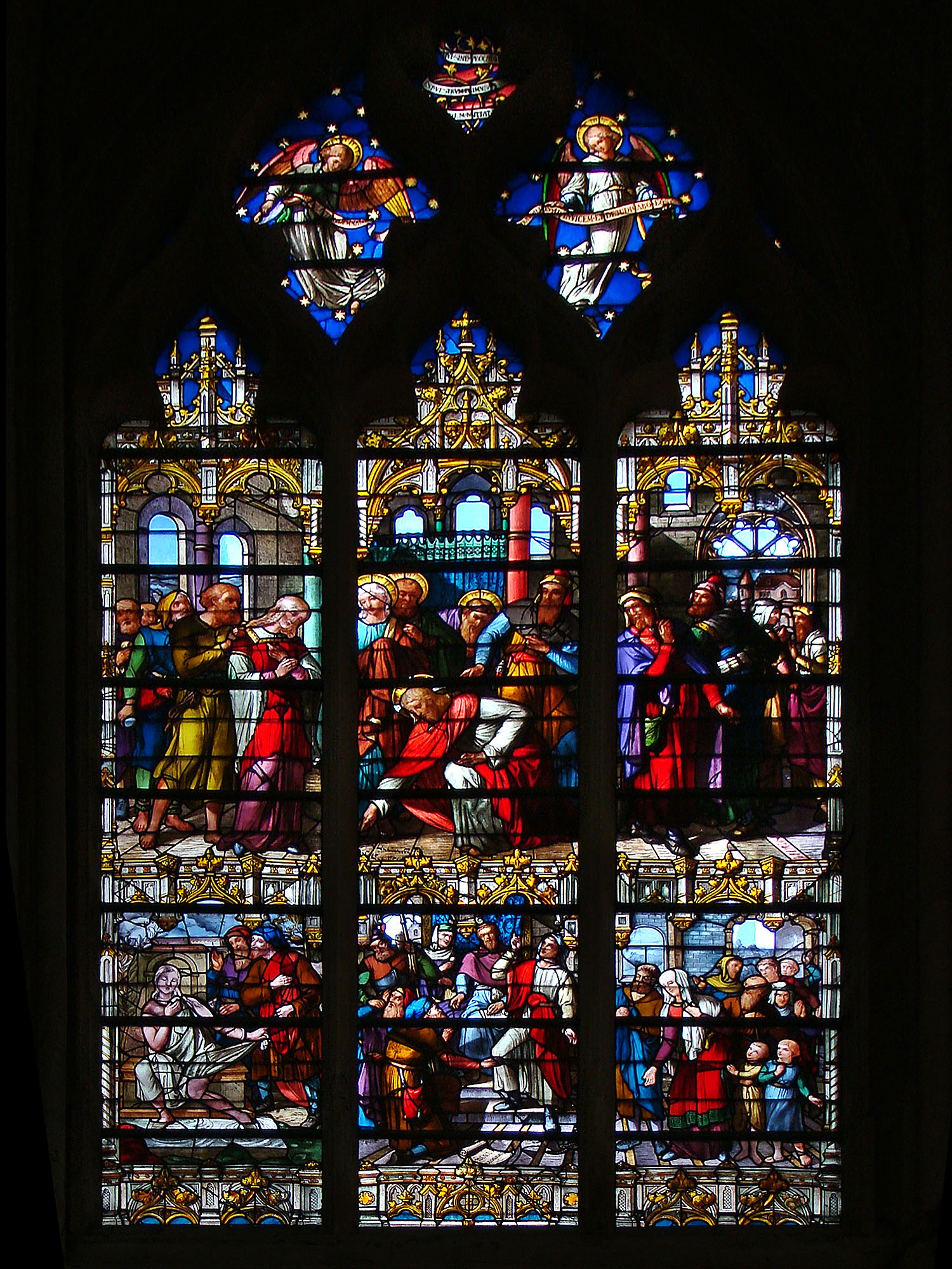 Notre-Dame de Senlis, Oise, Picardie, France.